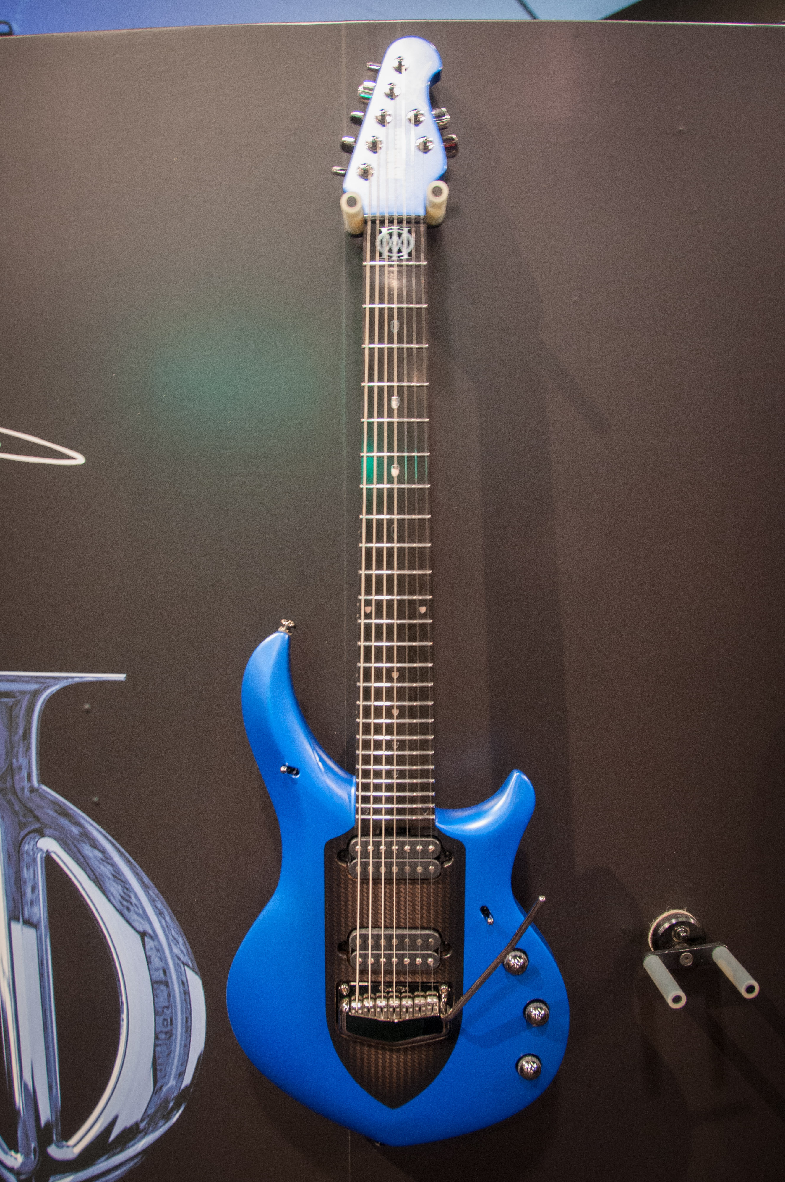 New Ernie Ball John Petrucci model guitar